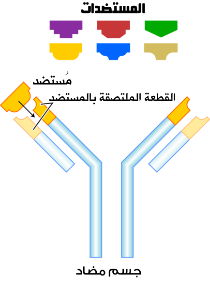 أصل الصورة : قمت بتغيير بعض الخطوط لتبدو أكثر جمالأ